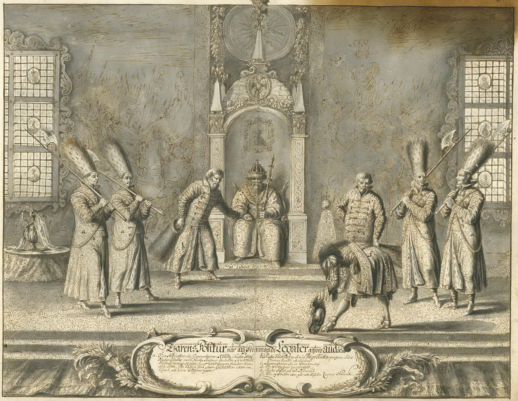 Приём царём Алексеем Михайловичем шведского посольства в 1674.